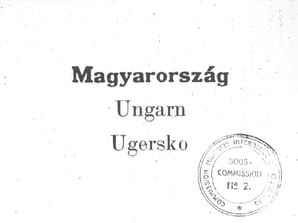 stimmzettel ungarn volksabstmmung sopron 1921